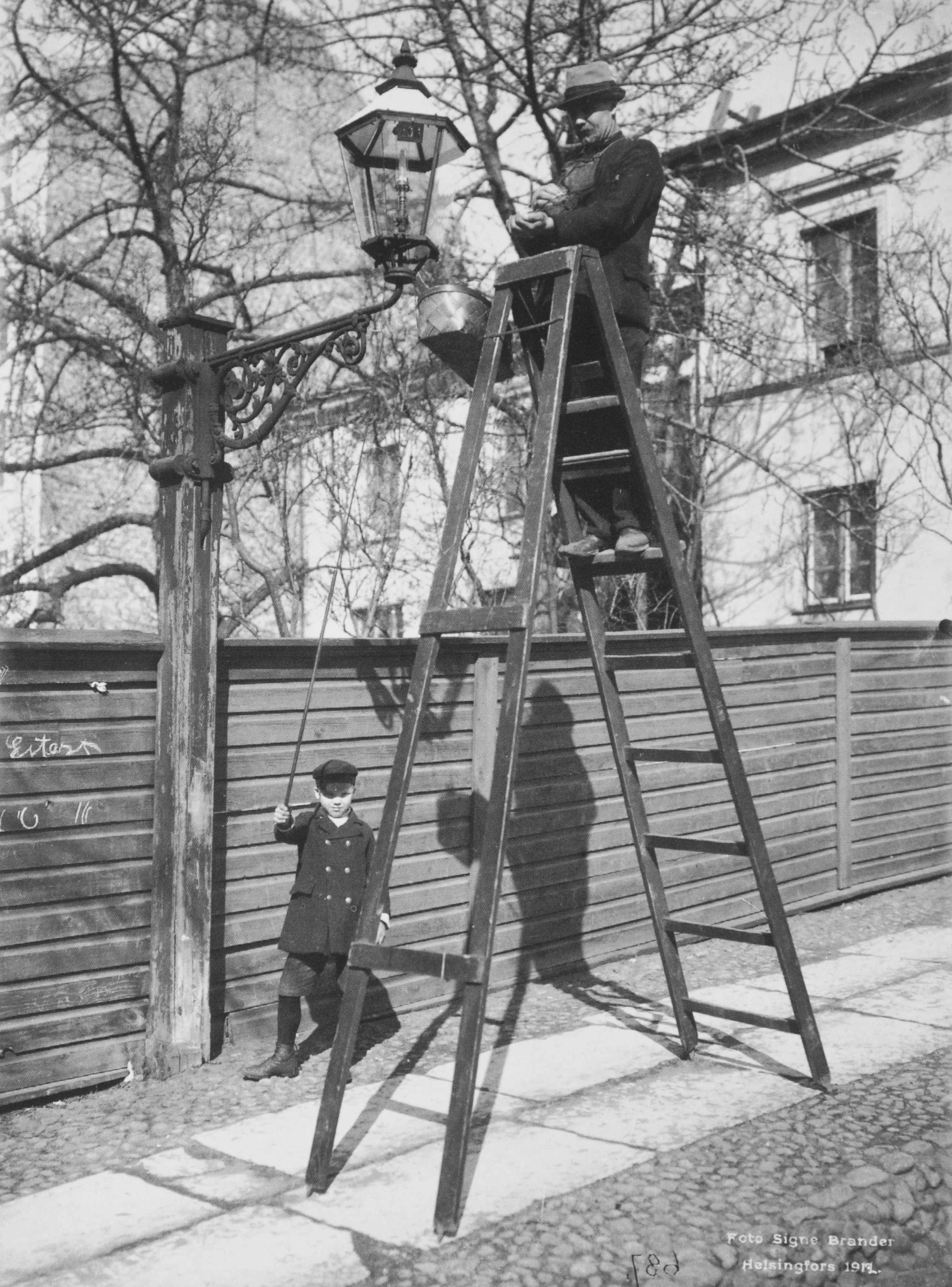 Katulyhdyn puhdistaja Konstantininkatu 10:ssä (nykyisin Meritullinkatu) vuonna 1912.